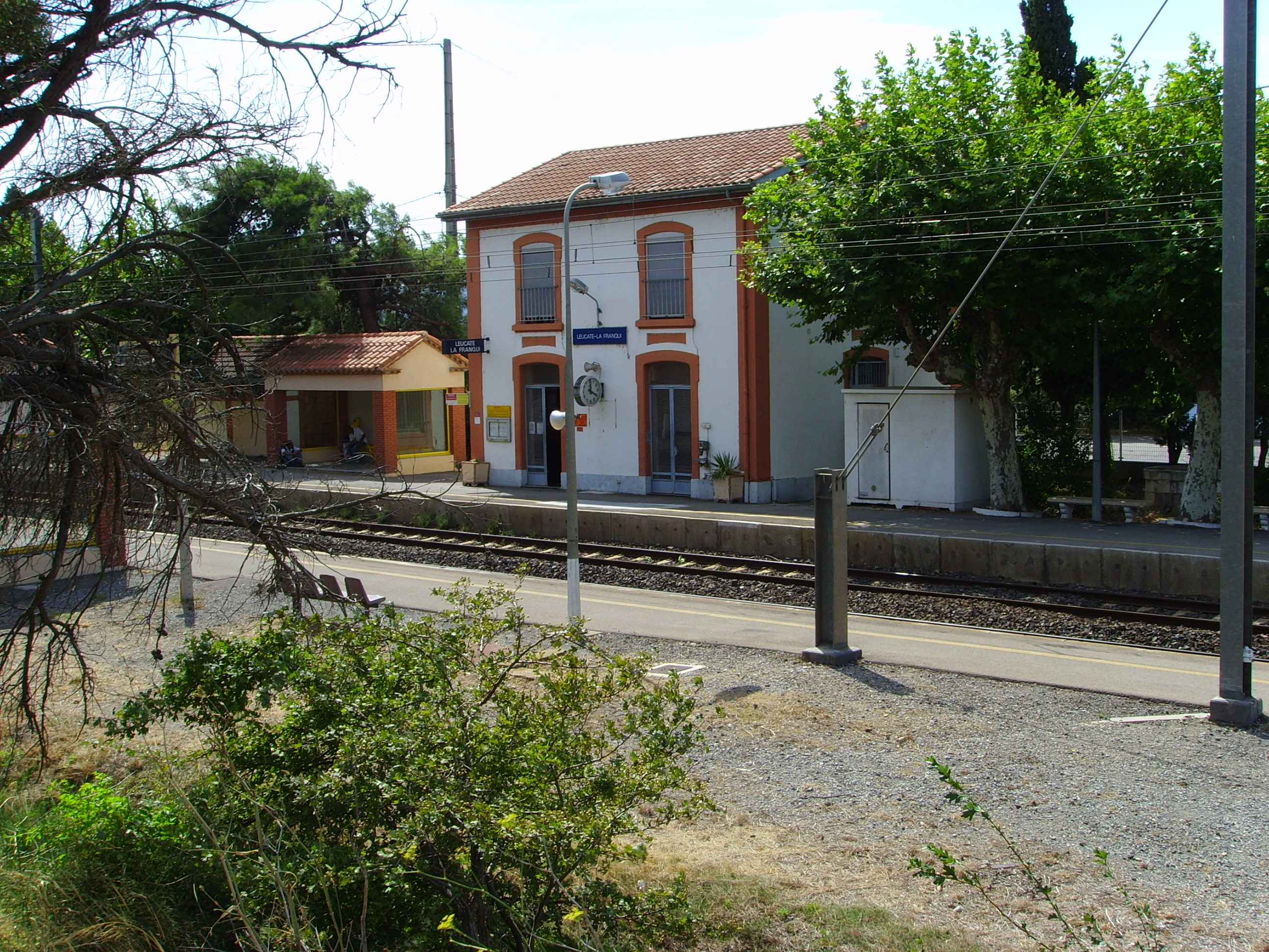 Leucate, Aude, France: La Franqui railway station photographer: Gerbil, summer 2006